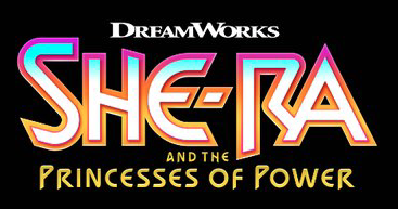 Logo de la série.